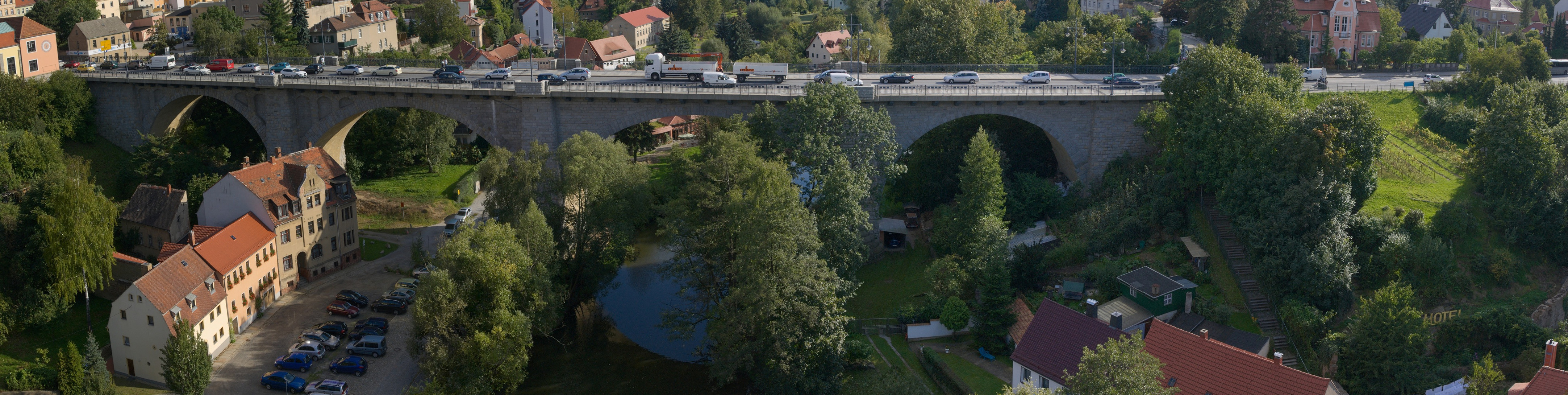 Aufgenommen von der Wasserkunst